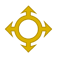 Distintivo da Arma de Comunicações